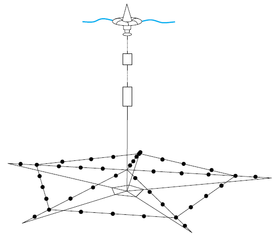 Пространственное расположение 40 гидрофонов (чёрные кружки) развёрнутого гидроакустического буя AN/SSQ-101. Конструкция напоминает перевёрнутый вверх ногами каркас зонтика с пятью спицами, соединёнными тросиками. На каждой спице установлено по 5 гидрофонов, на каждой стороне пятиугольника - по 3.